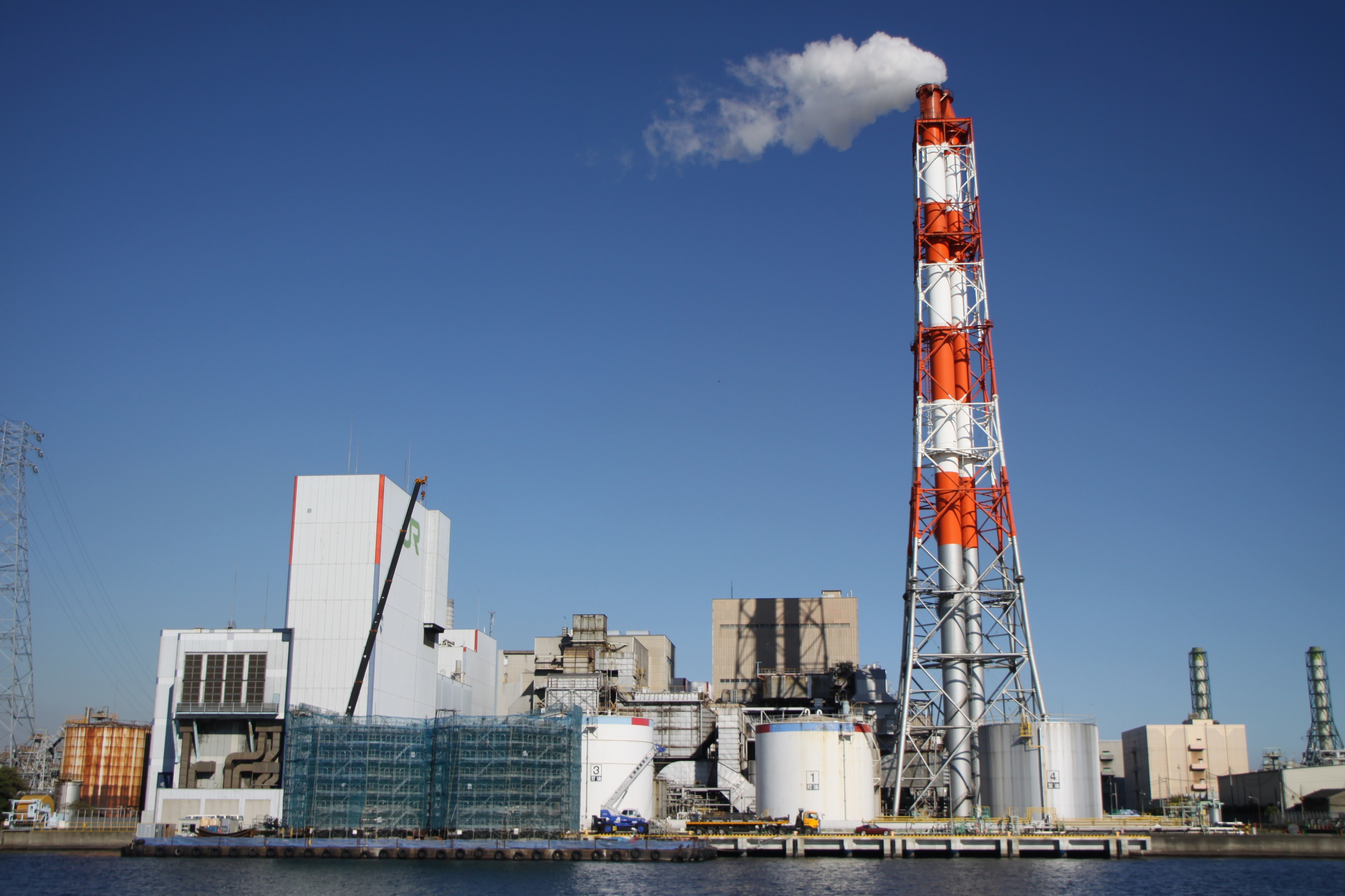 JR東日本川崎火力発電所（大川町側から撮影）